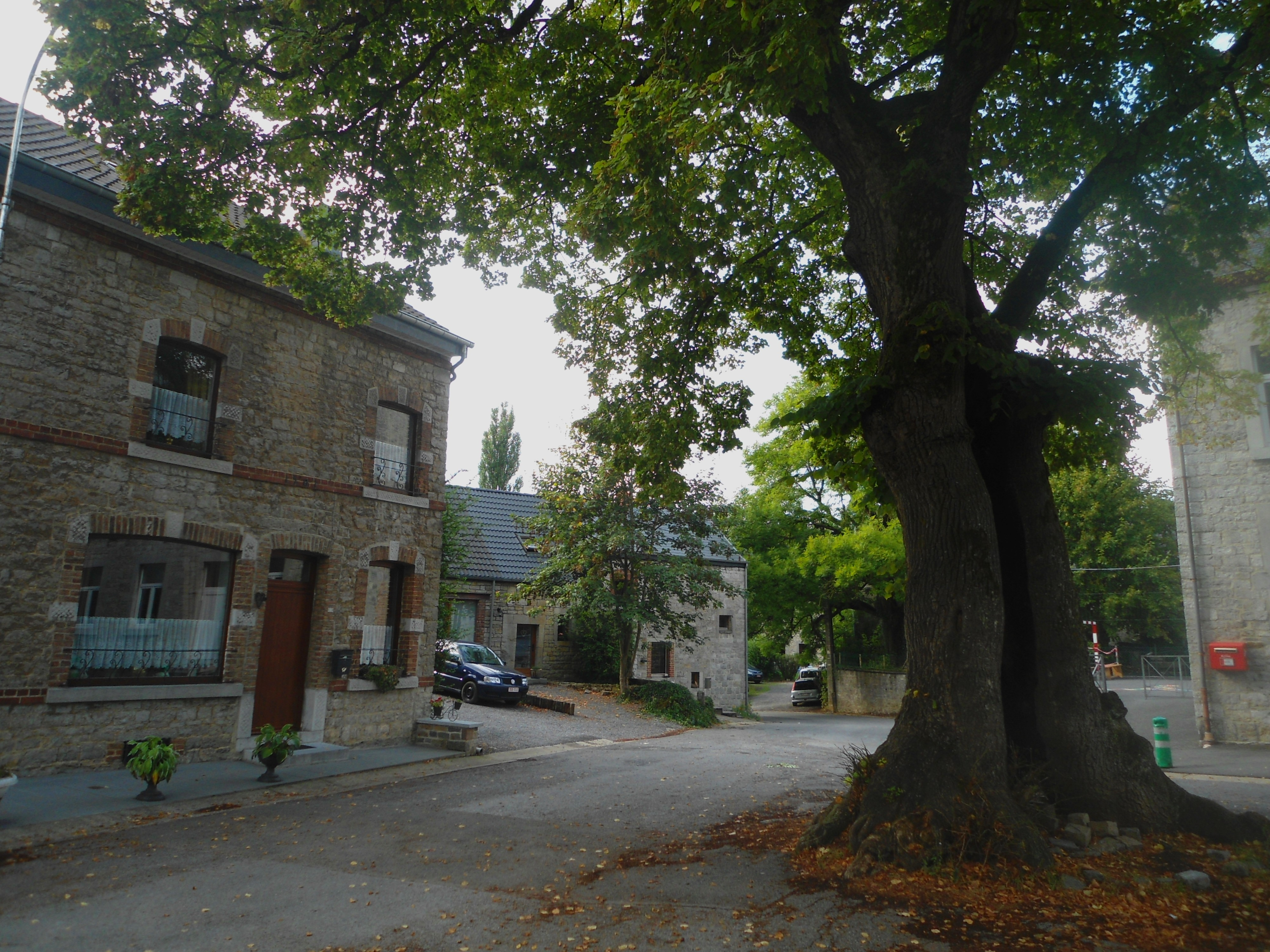 Place de My Ferrières